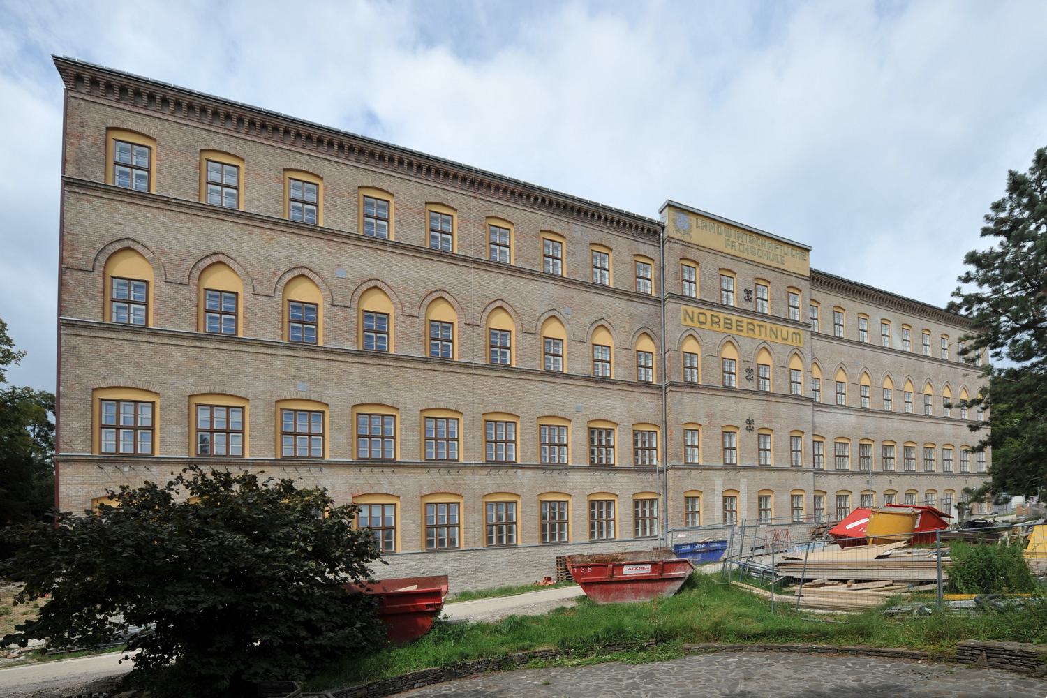 Tullnerbach: Schule Norbertinum und Wirtschaftsgebäude, Norbertinumstr. 11, 12